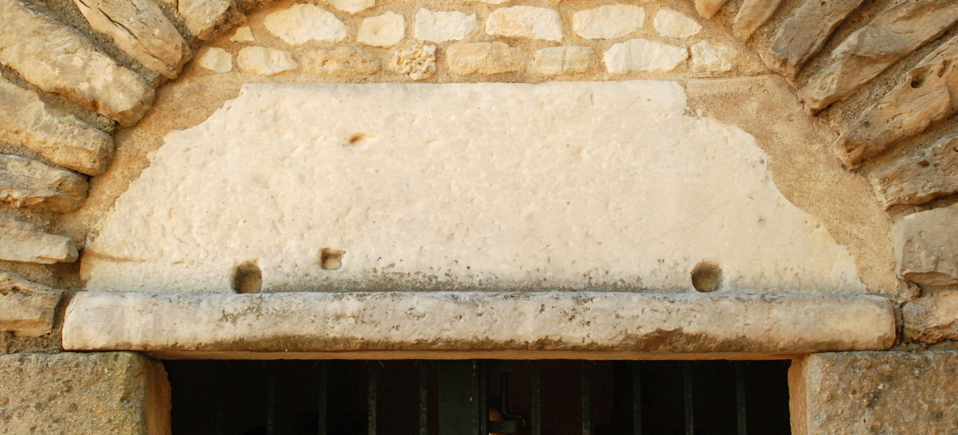 France - Languedoc - Aude - Moussan - chapelle Saint-Laurent (préroman) - linteau .